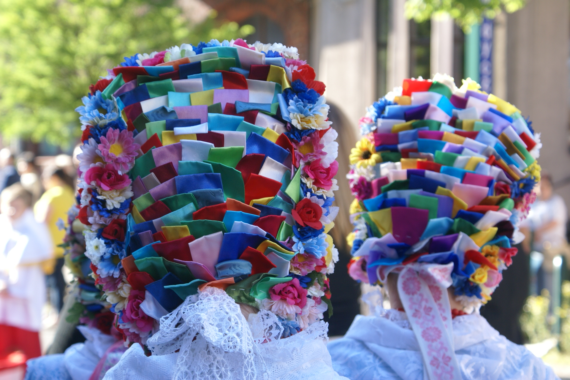 Procesja Bożego Ciała This photo has been taken in the country: Poland